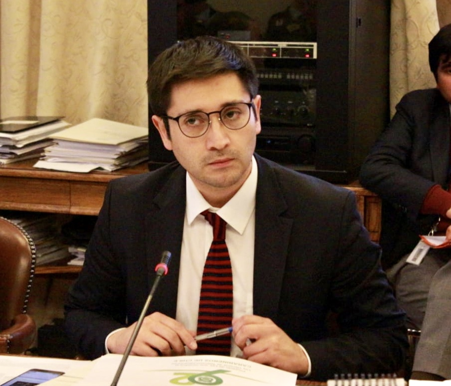 Fotografía Presidiendo Comisión de Seguridad Ciudadana